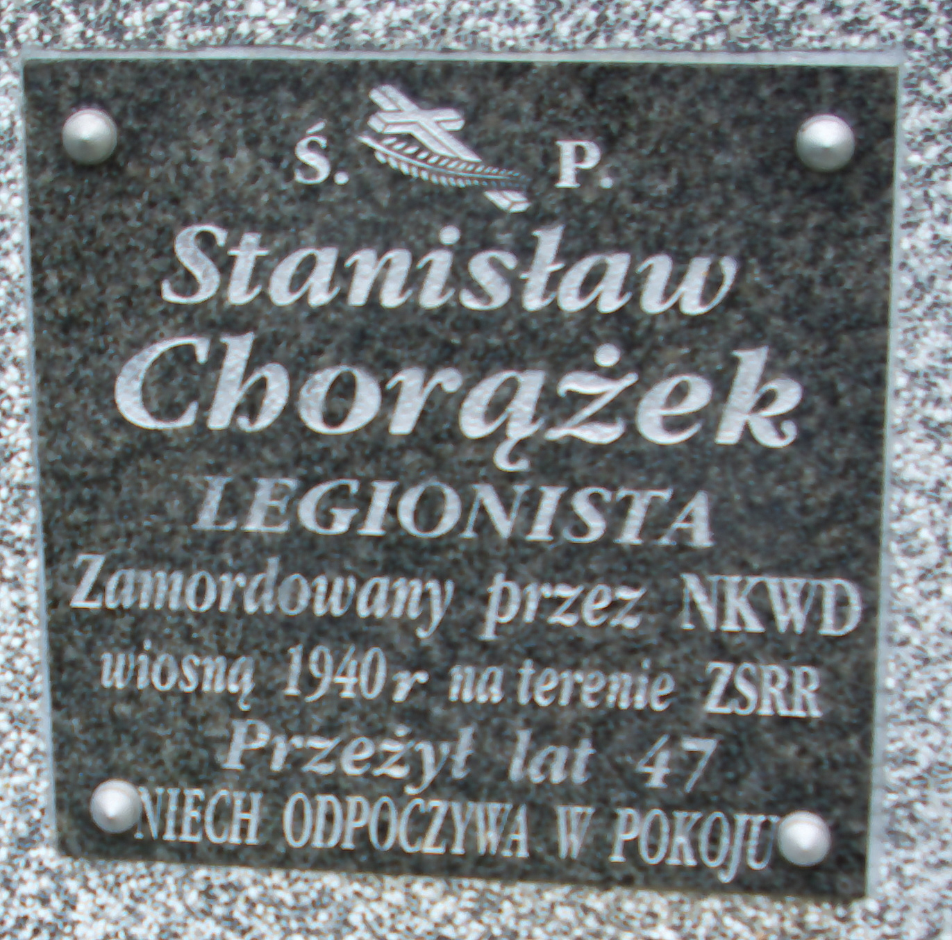 Symbolicznie upamiętnienie przod. Stanisława Chorążka, ofiary zbrodni katyńskiej na grobowcu rodzin Bodnarów i Boguckich na Cmentarzu Centralnym w Sanoku, części Matejki